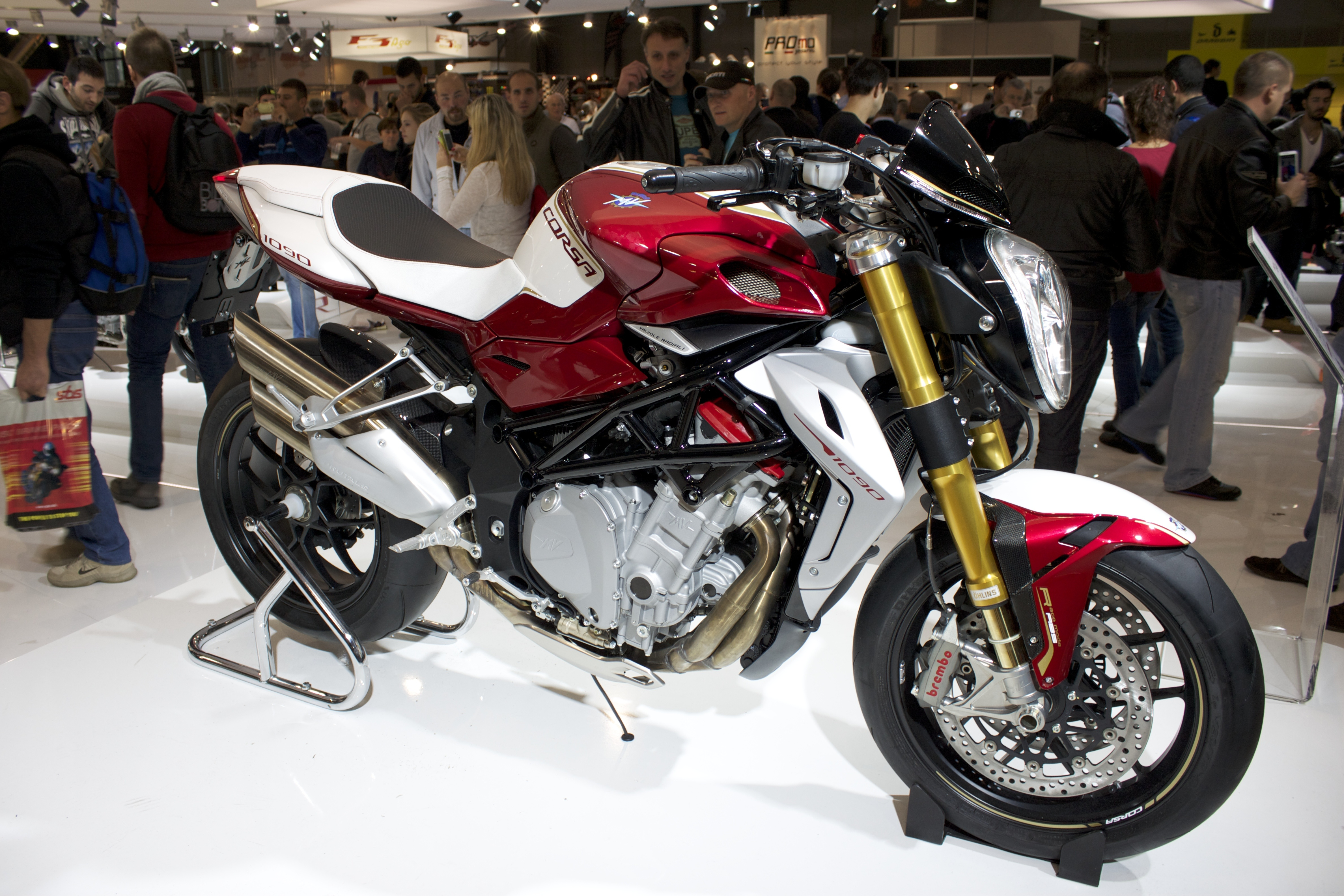 MV Agusta Brutale 1090 Special Edition "Corse"